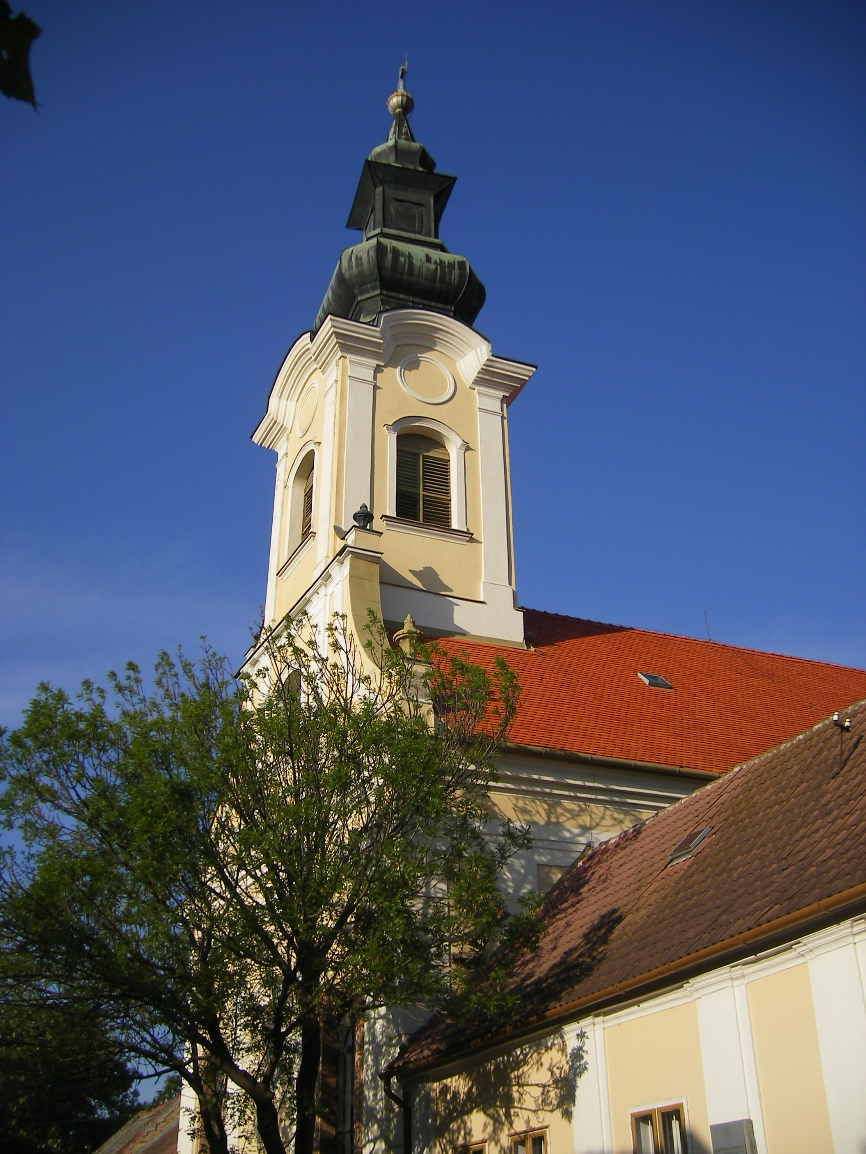 Komárom - Evangélikus templom